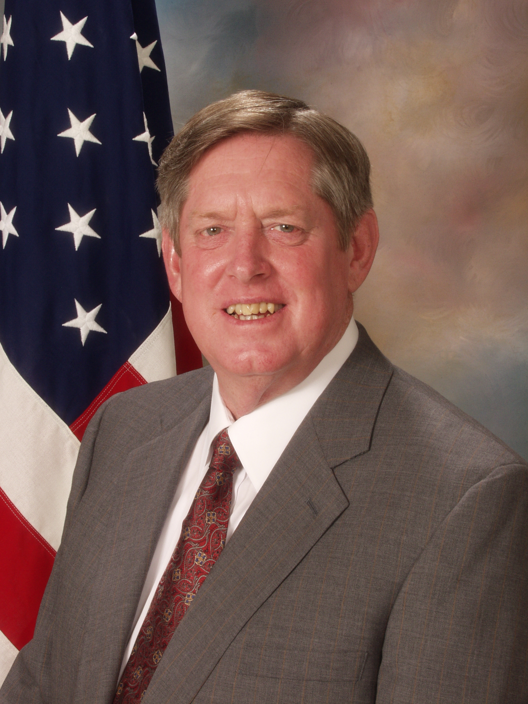 Rep Marion Berry from Arkansas